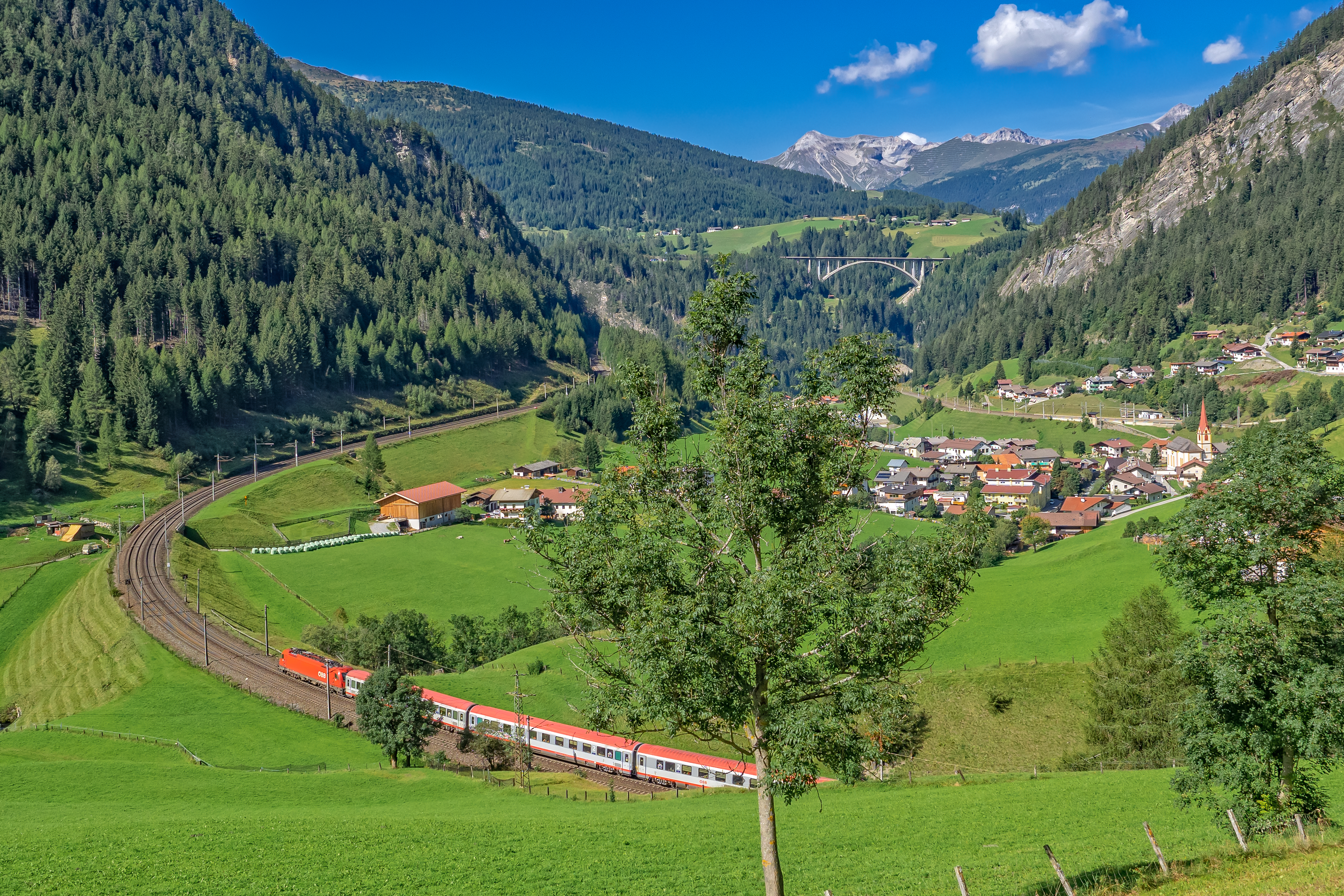 ÖBB Italia - München - Innsbruck - Verona